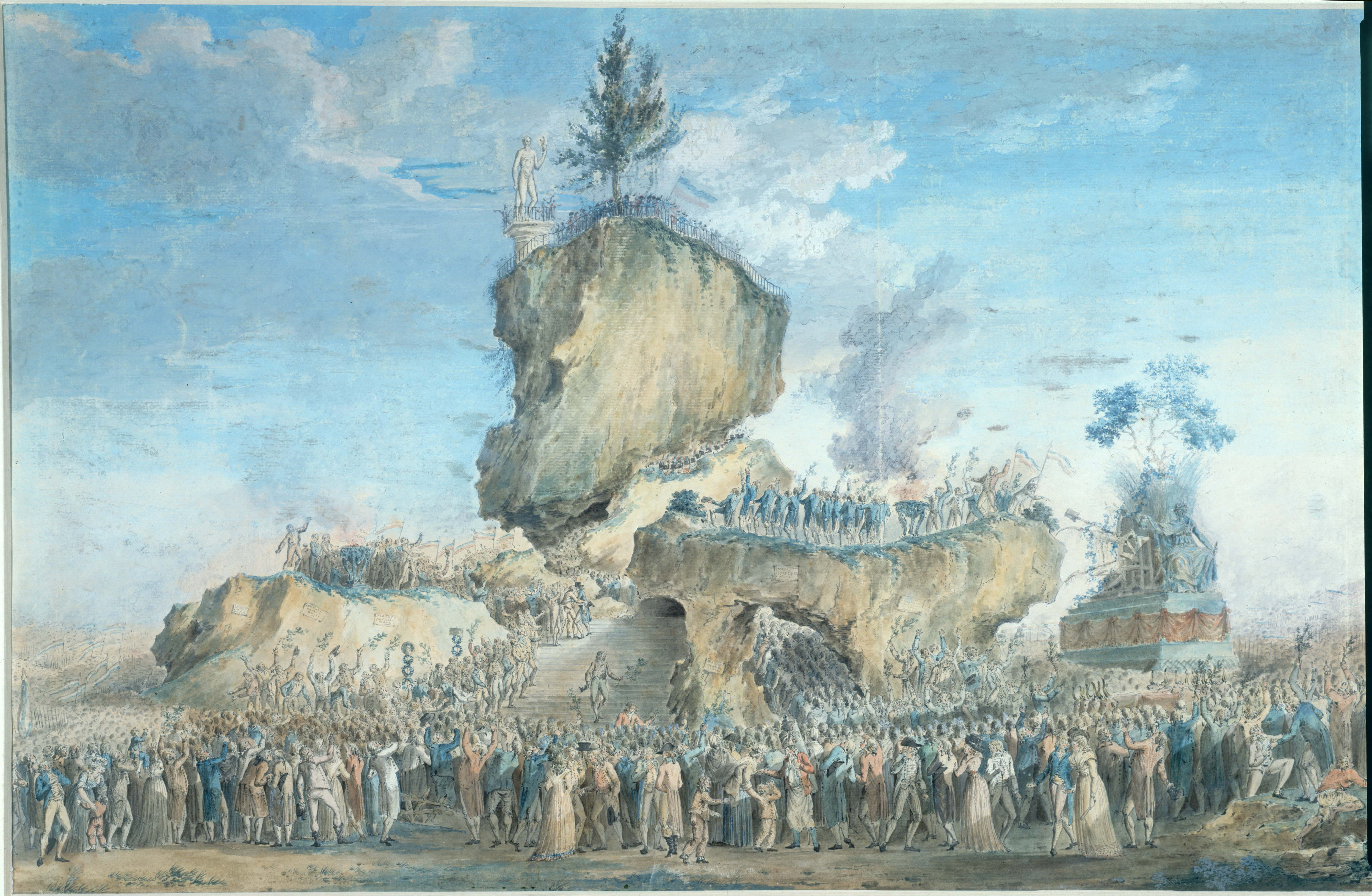 Thomas Charles Naudet, (1778 - 1810).- Fête de l'Être suprême au Champ de Mars le 20 prairial an II (8 juin 1794), Musée Carnavalet, Paris.